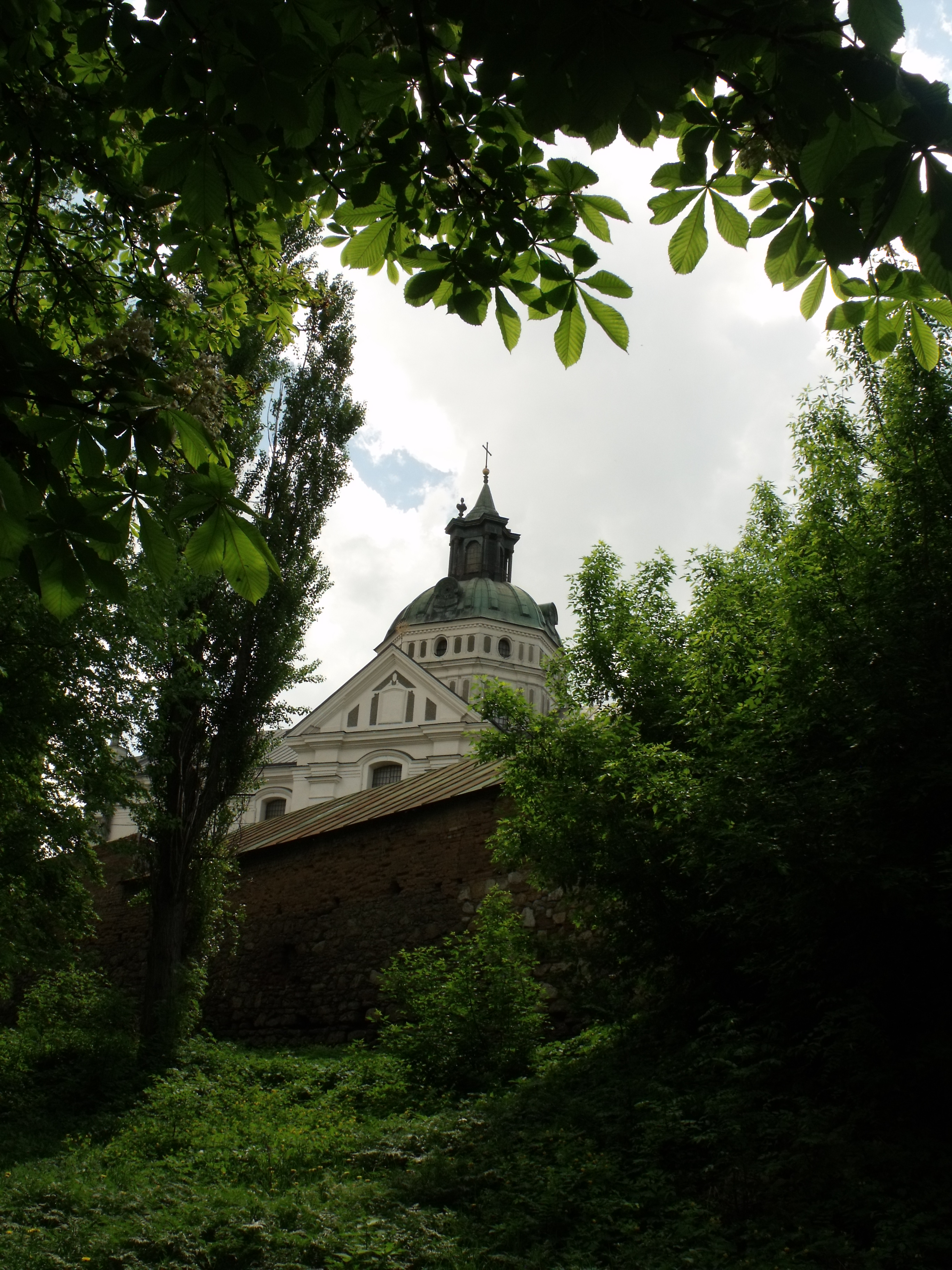 Фортечні мури з баштами та келіями: Бердичів, Радянська пл.